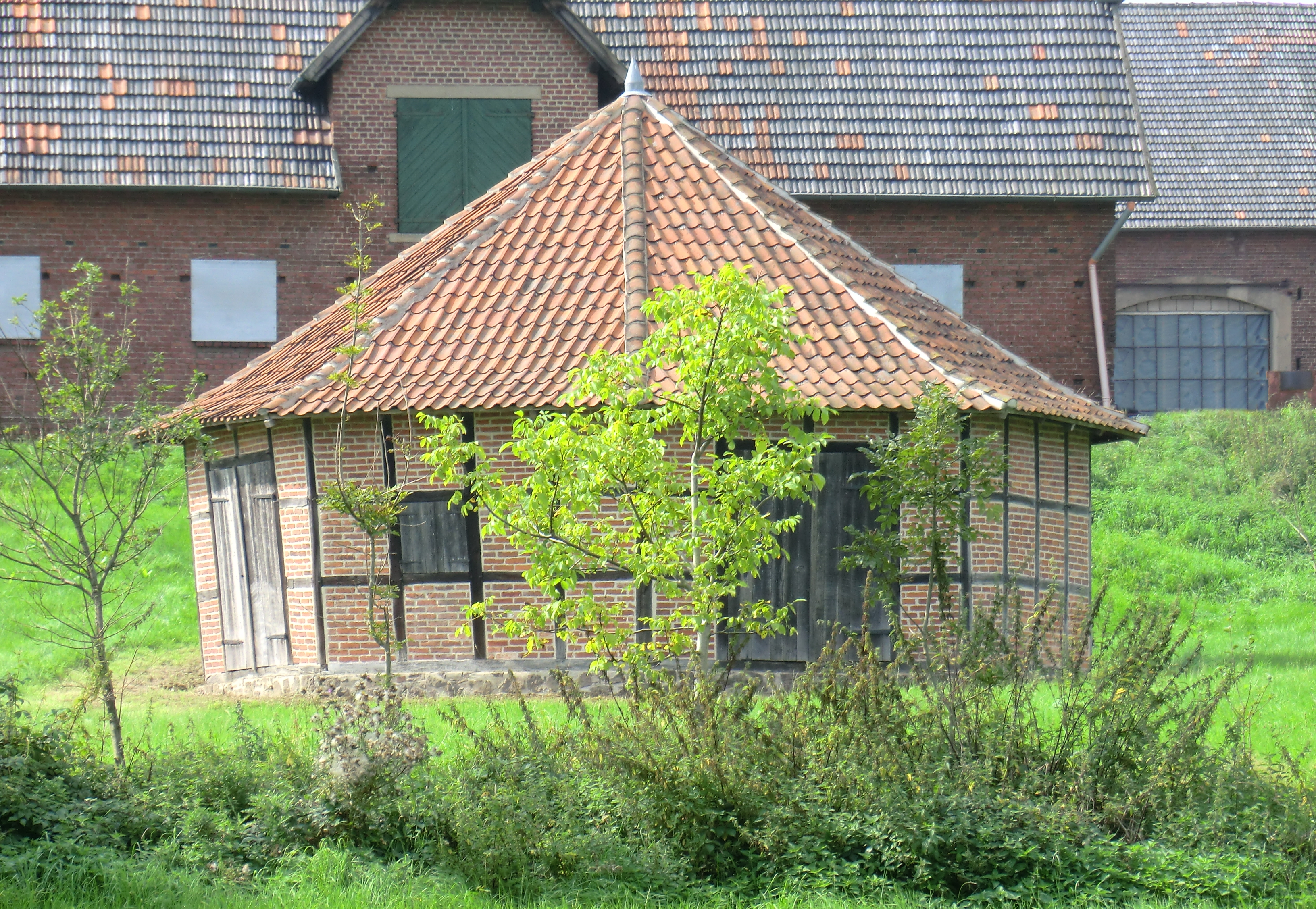 Pferdegöpel in Hiddenhausen, Ostansicht; ausführliche Beschreibung: This is a photograph of an architectural monument.